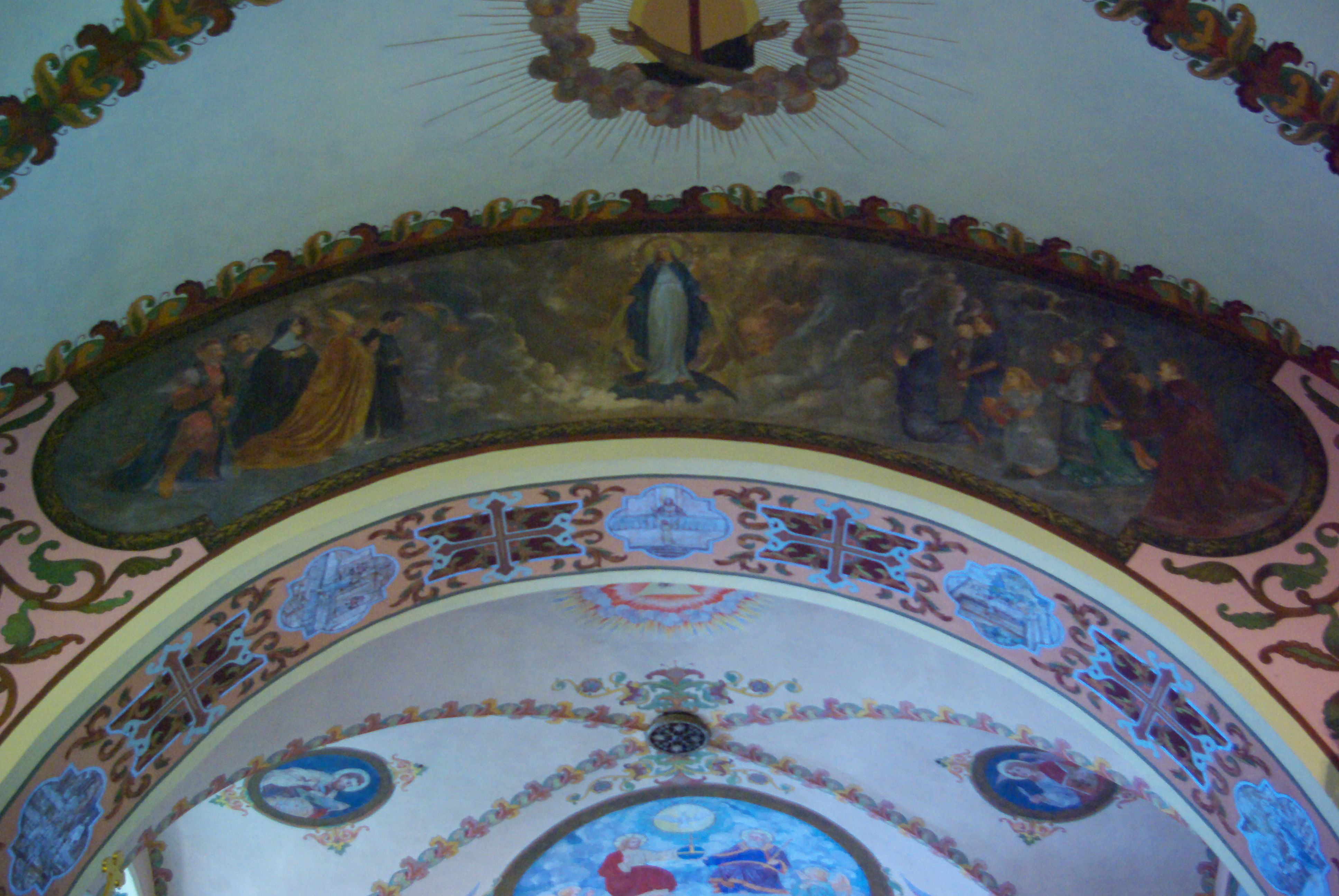 Polichromia autorstwa Władysława Lisowskiego w kościele franciszkanów w Sanoku. Adoracja Matki Bożej. Pierwszy z lewej odwzorowany Maksymilian Słuszkiewicz.